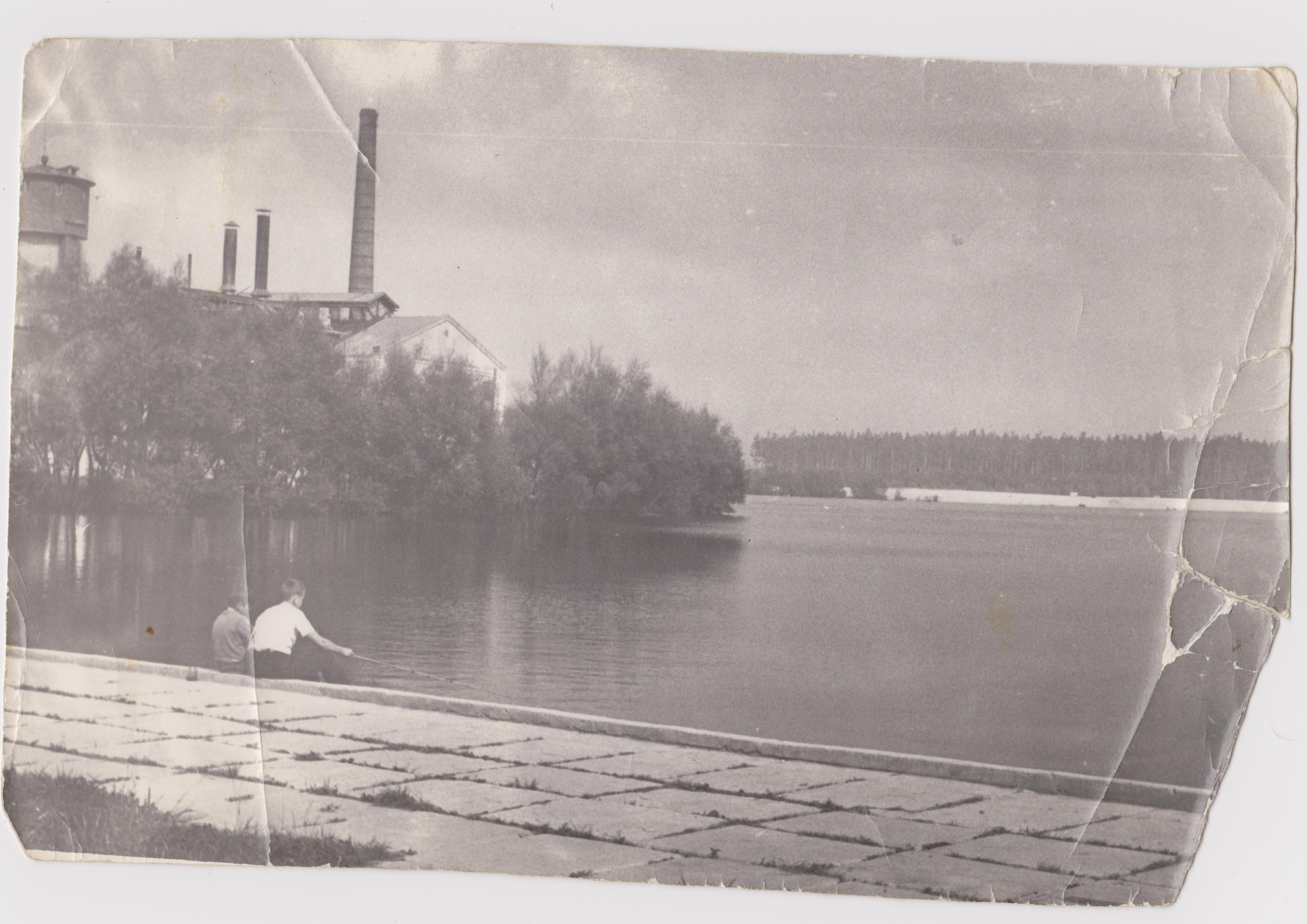 Вид на бывший завод и озеро, 1970-ые года.